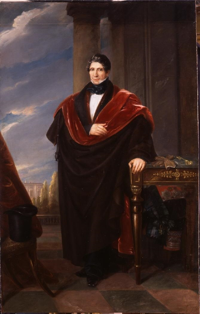 Retrato del aristócrata y coleccionista español Fernando de Aguilera y Contreras (1784-1838), décimoquinto marqués de Cerralbo y Grande de España.